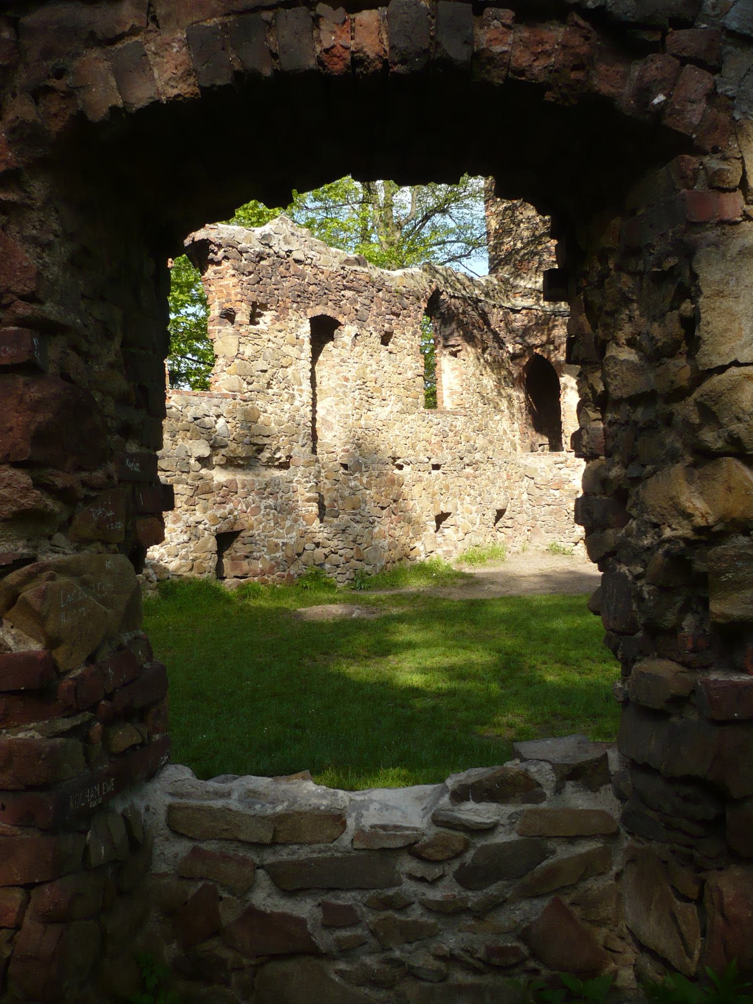 Stary Książ